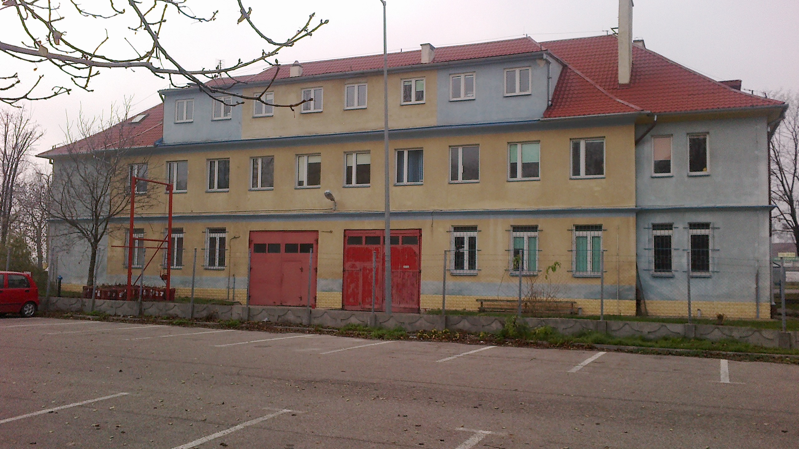 Zakładowa Straż Pożarna Janikosoda